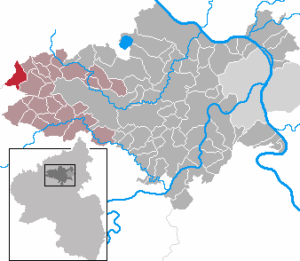 Herresbach in Rhineland-Palatinate - district Mayen-Koblenz